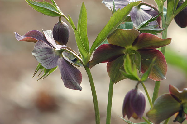 čemeřice nachová Helleborus purpurascens